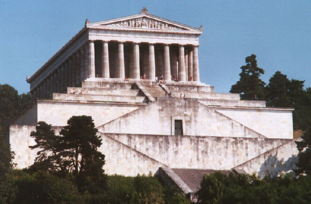 Blick auf die Walhalla von Süden